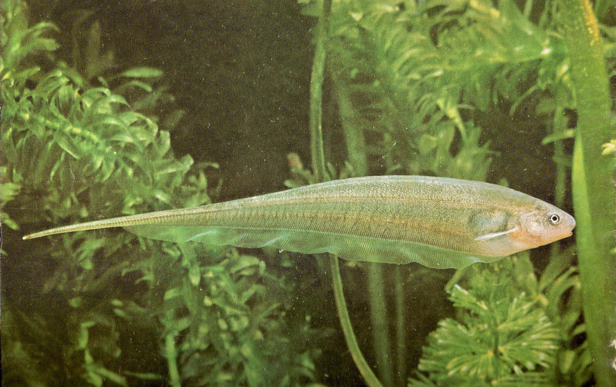 Eigemania viricens (foto tomada en acuario)